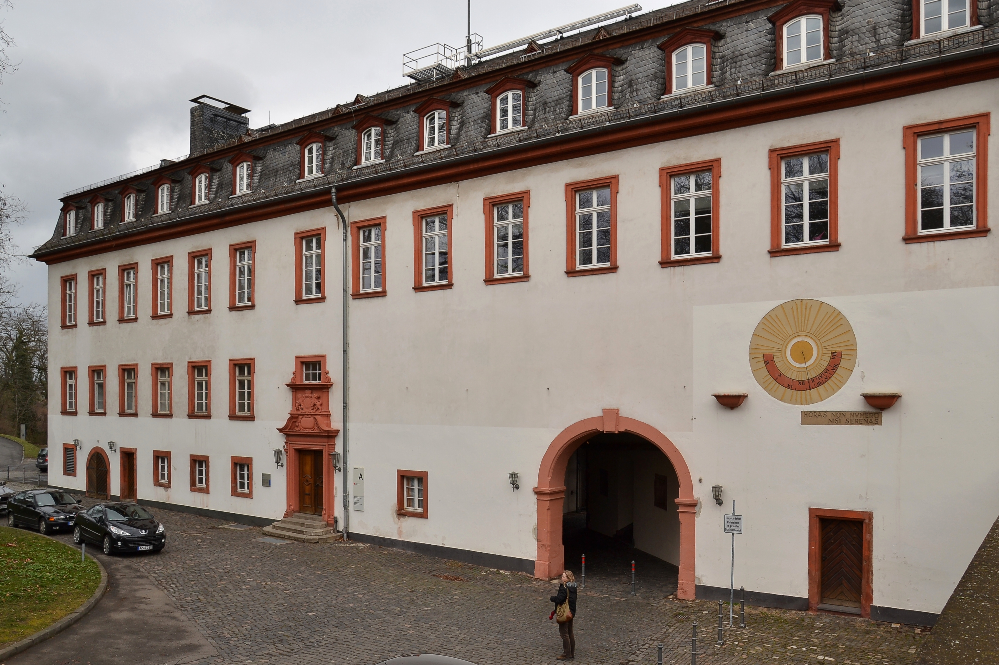 Zitadelle Mainz - Der Kommandantenbau